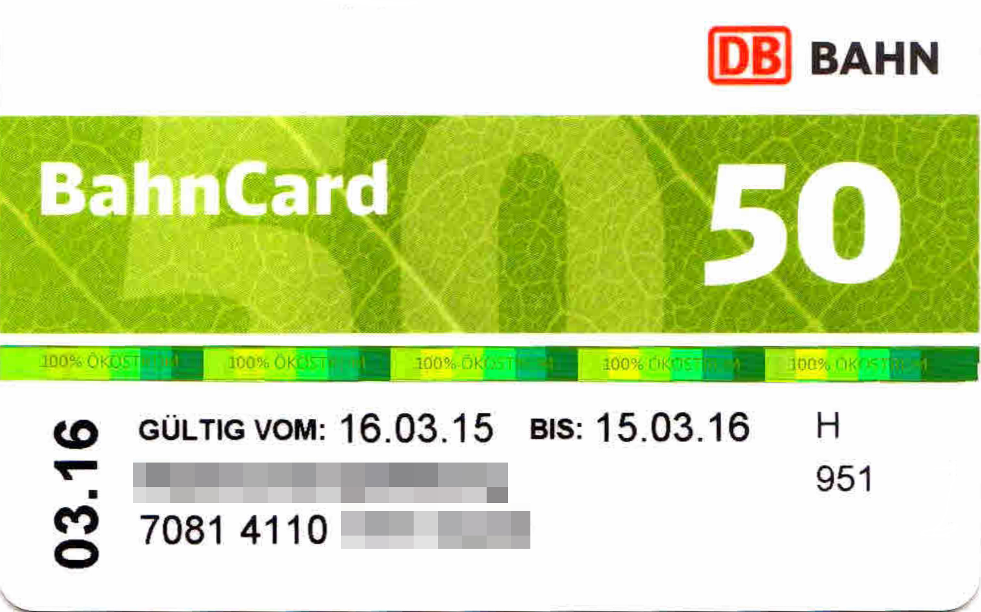 BahnCard 50 im grünen Desgin für "100 % Ökostrom"